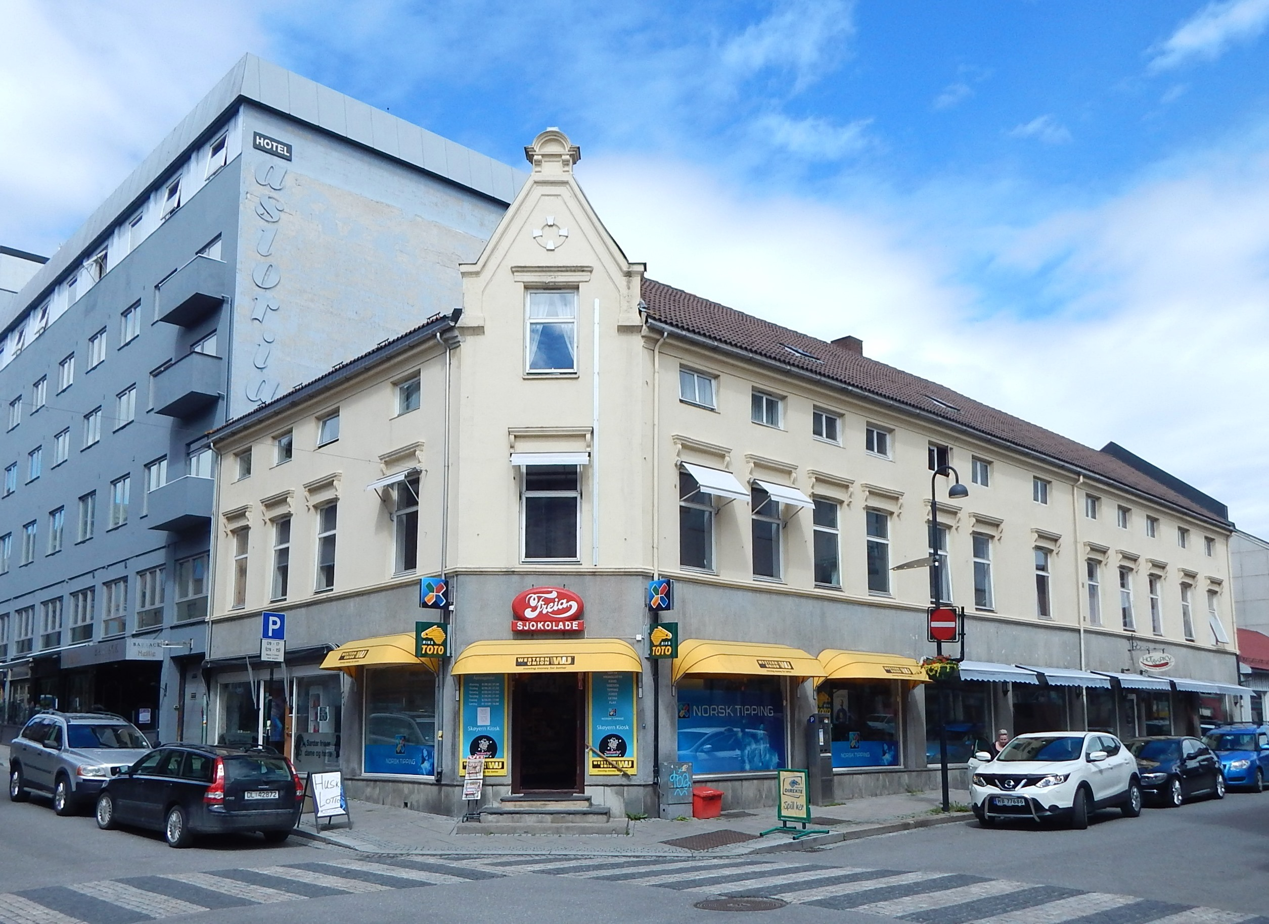 Torggata 13 på Hamar. Arkitekt: Christian Reuter.